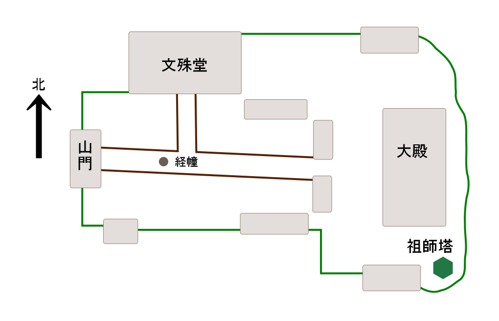 佛光寺伽藍配置